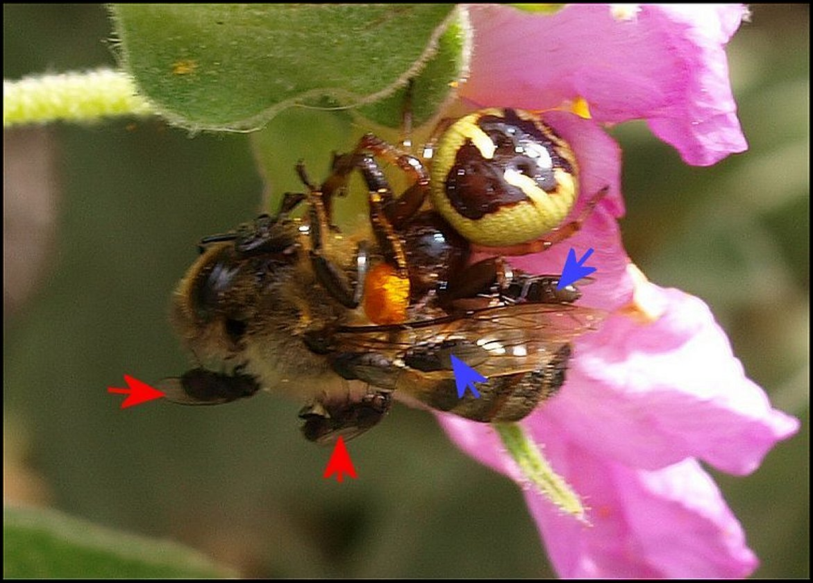 Araignée Thomise se nourrissant d'une Abeille qui attire des Milichiidae